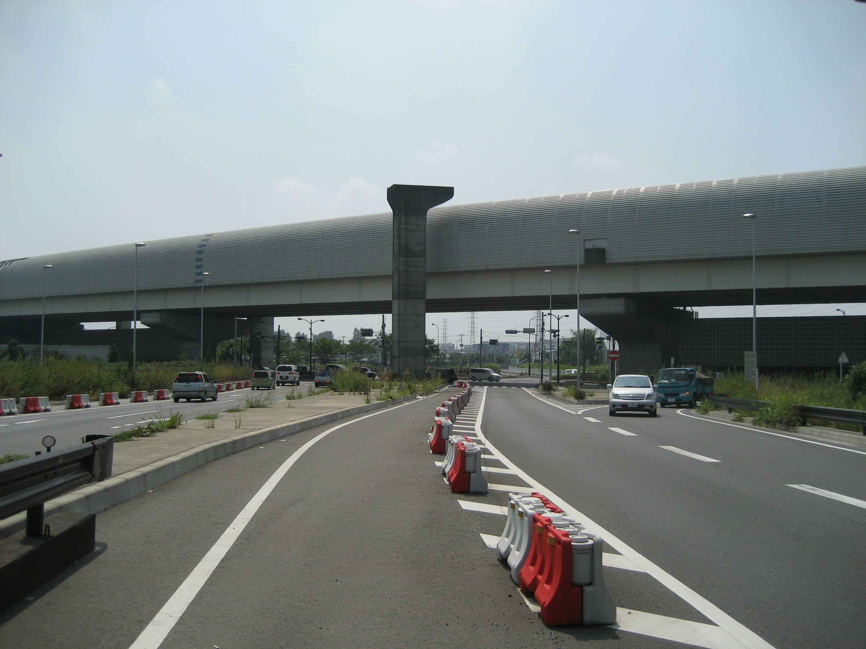 東埼玉道路八潮ジャンクション